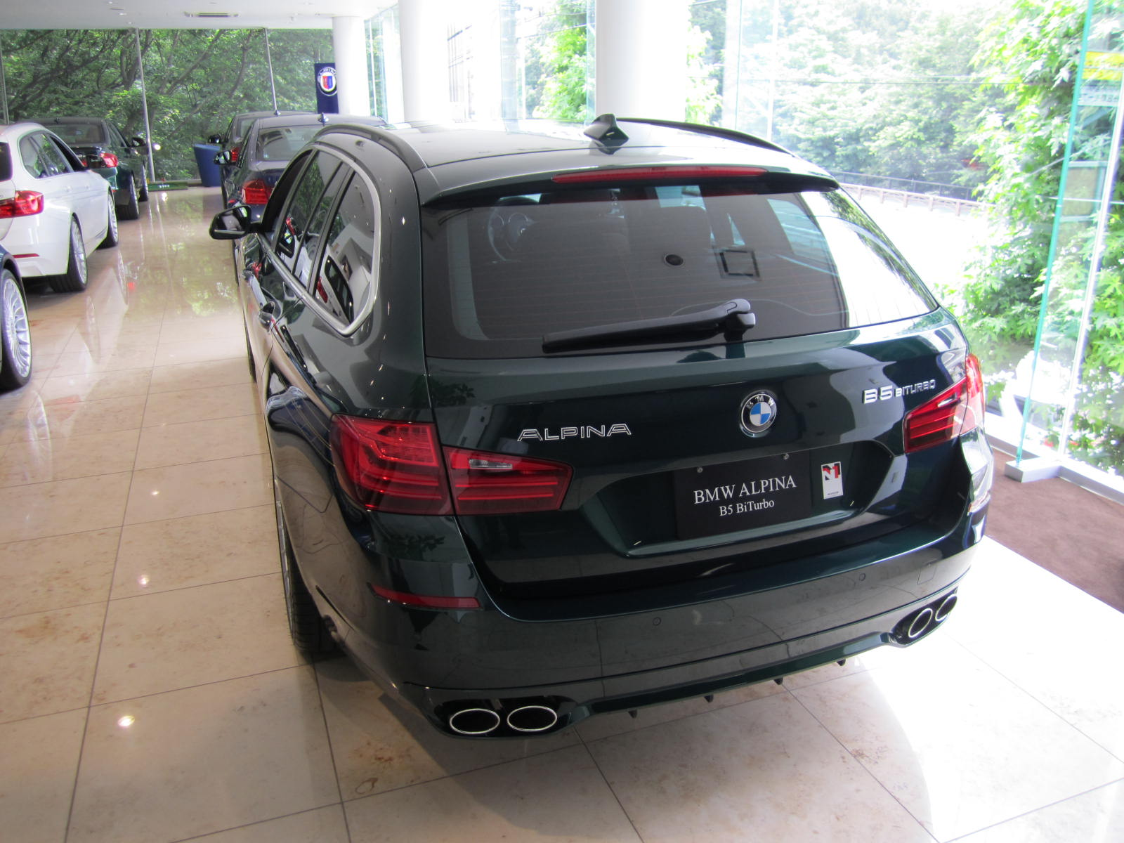 2013B5ツーリングリアLCI後